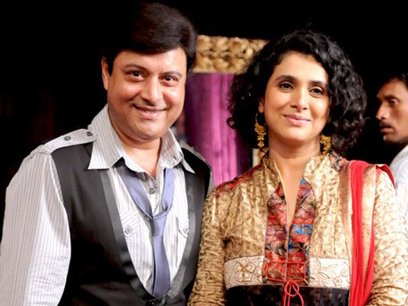 Sachin Pilagaonkar and Supriya Pilgaonkar at Star Pariwar Awards 2010